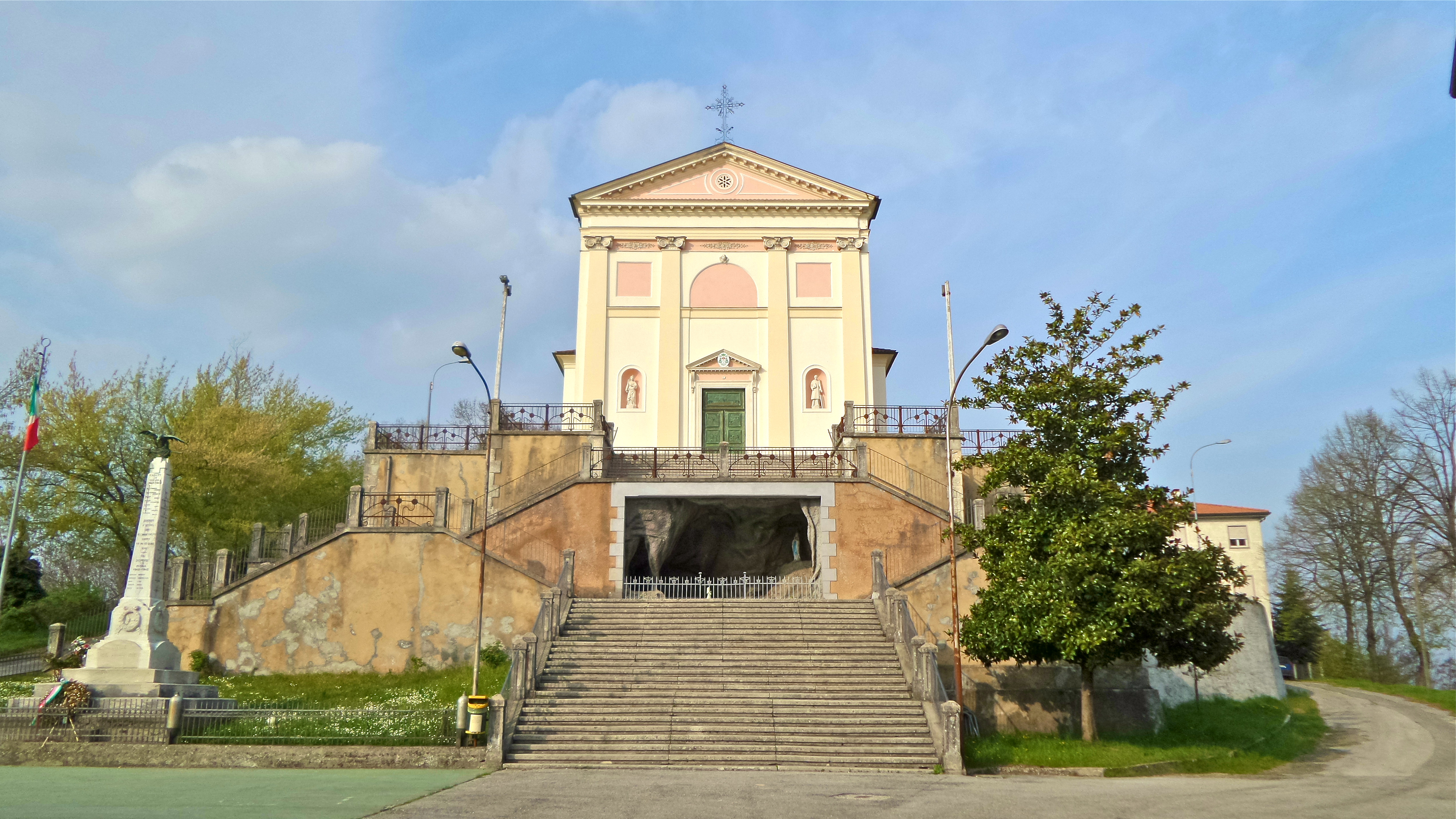 Facciata della chiesa dei santi Lorenzo e Lucia a Quargnenta